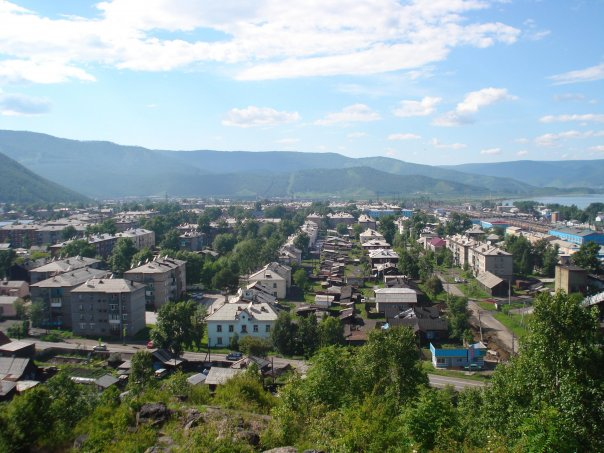 Фото вид Слюдянки